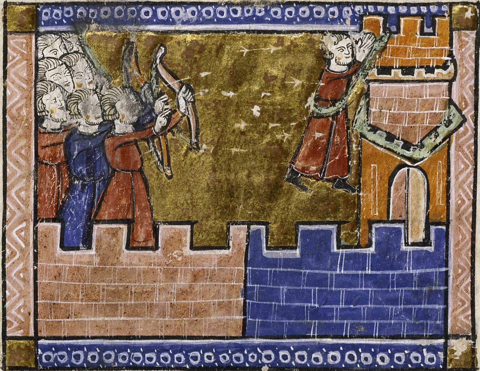 Mort de Thoros d'Édesse